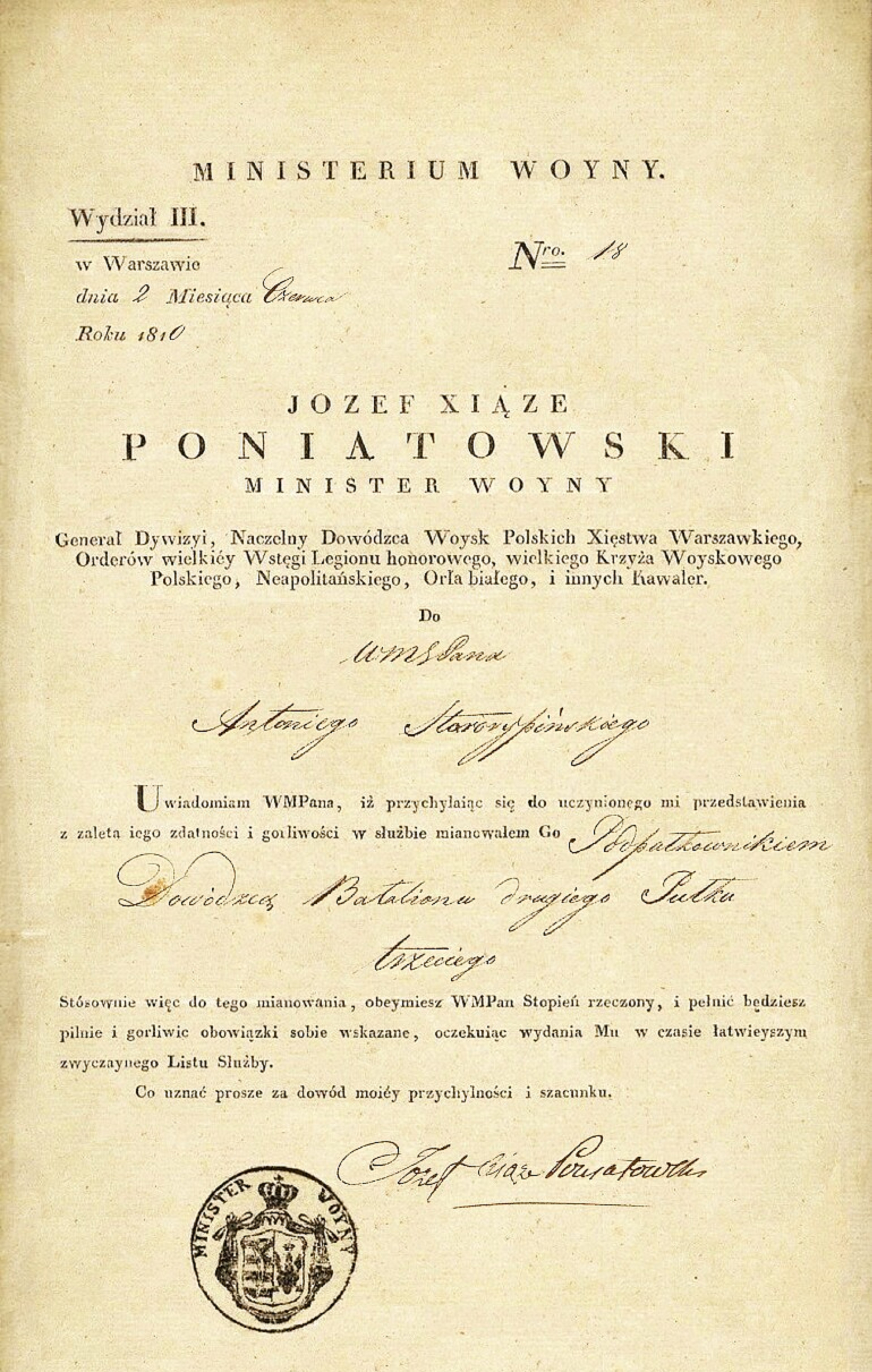 Antoni Starorypiński h. Nałęcz (1760-1830). Dziedzic dóbr Godziszewy. Pułkownik wojsk Księstwa Warszawskiego (1813 r.). Podpułkownik i dowódca 2. Batalionu w 3. Pułku Piechoty Księstwa Warszawskiego (1810 r.). Uczestnik powstania listopadowego. List wojskowy z własnoręcznym pismem księcia Józefa Poniatowskiego, wydany 02.06.1810 r. w Warszawie.